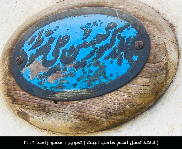 ( لافتة تحمل اسم صاحب البيت ) تصوير : محمو زاهد 2006